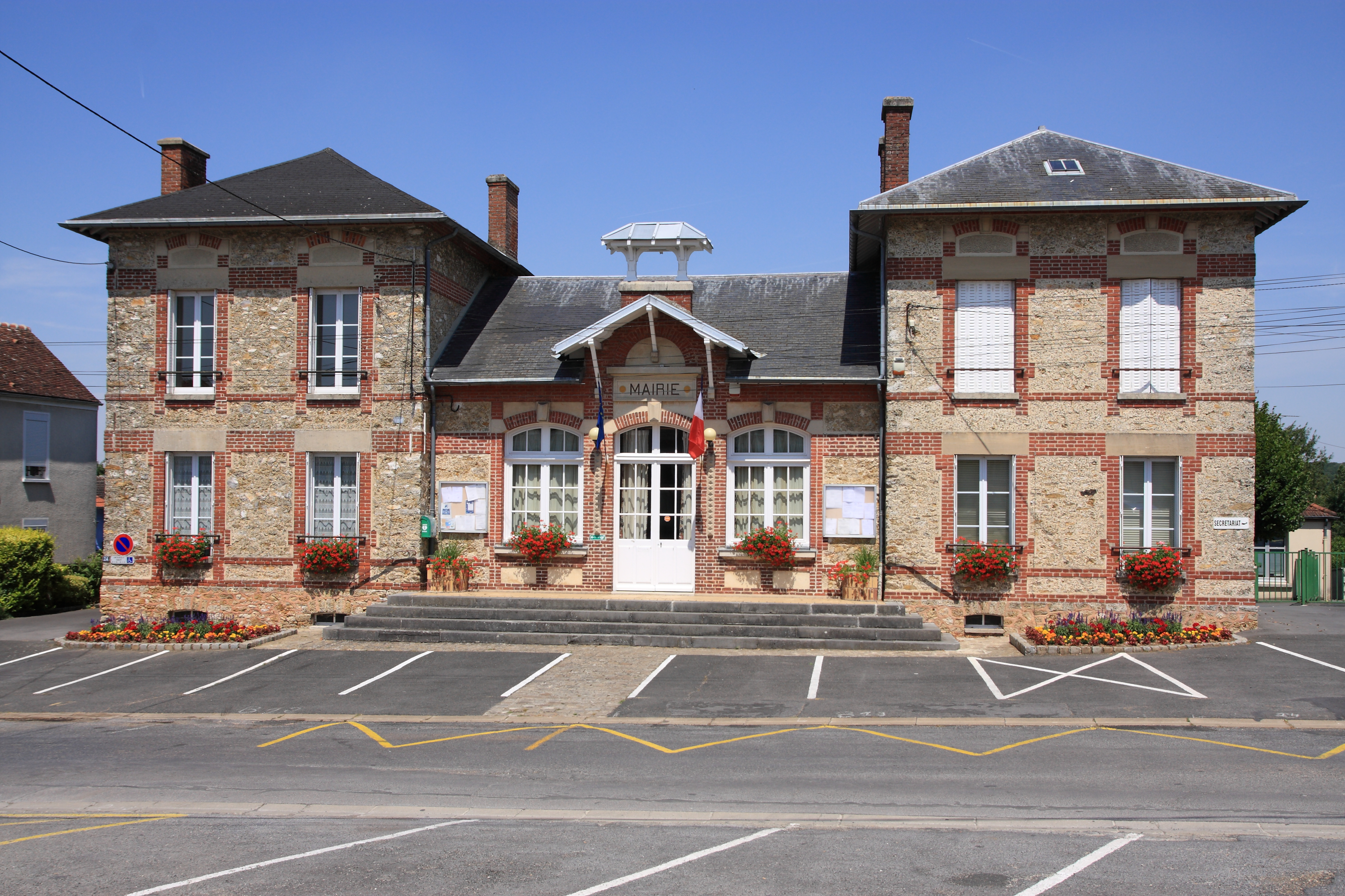 Mairie de Saint-Siméon (77)